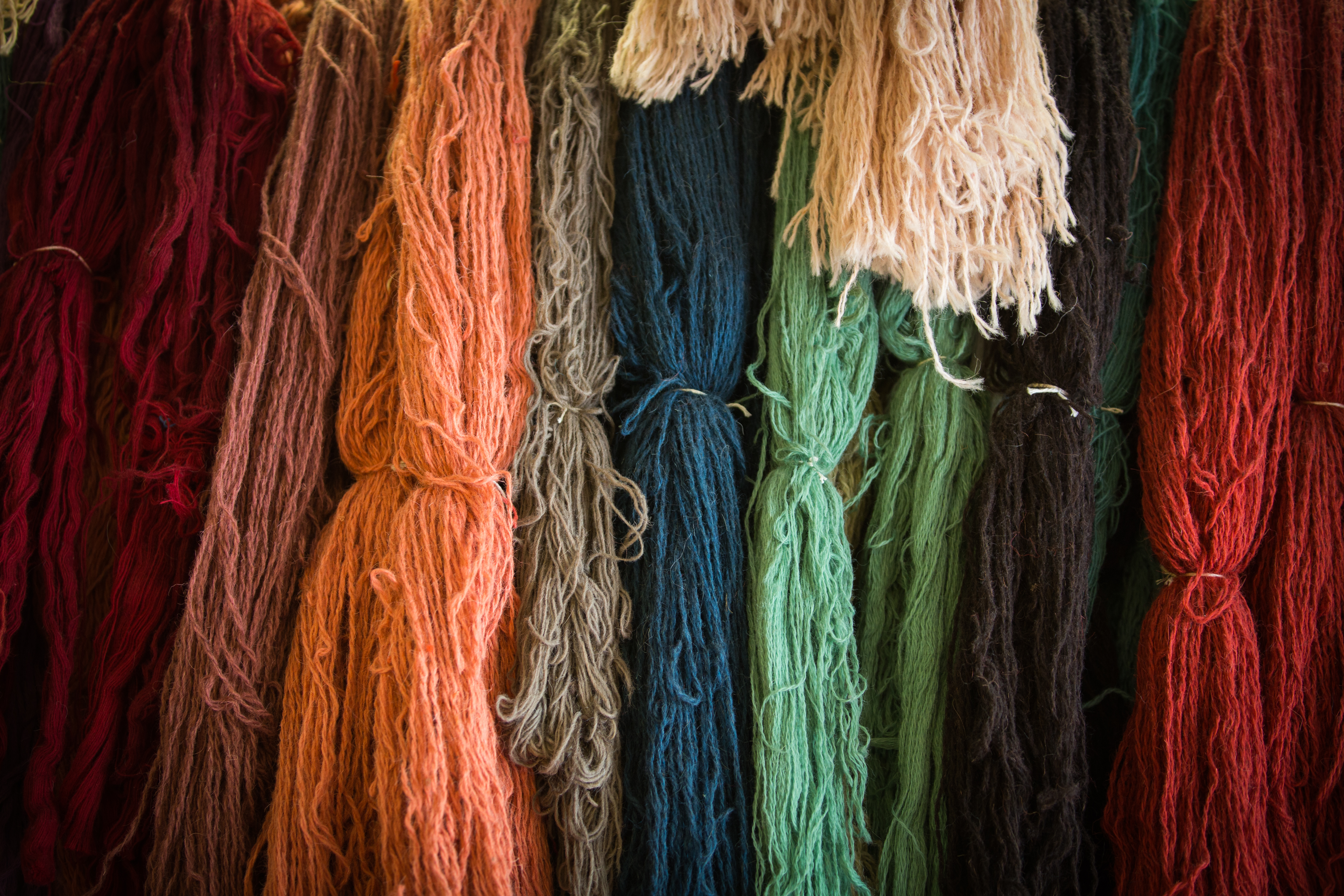 Atelier de restauration de tapis anciens «De fil en aiguille» à Strasbourg.